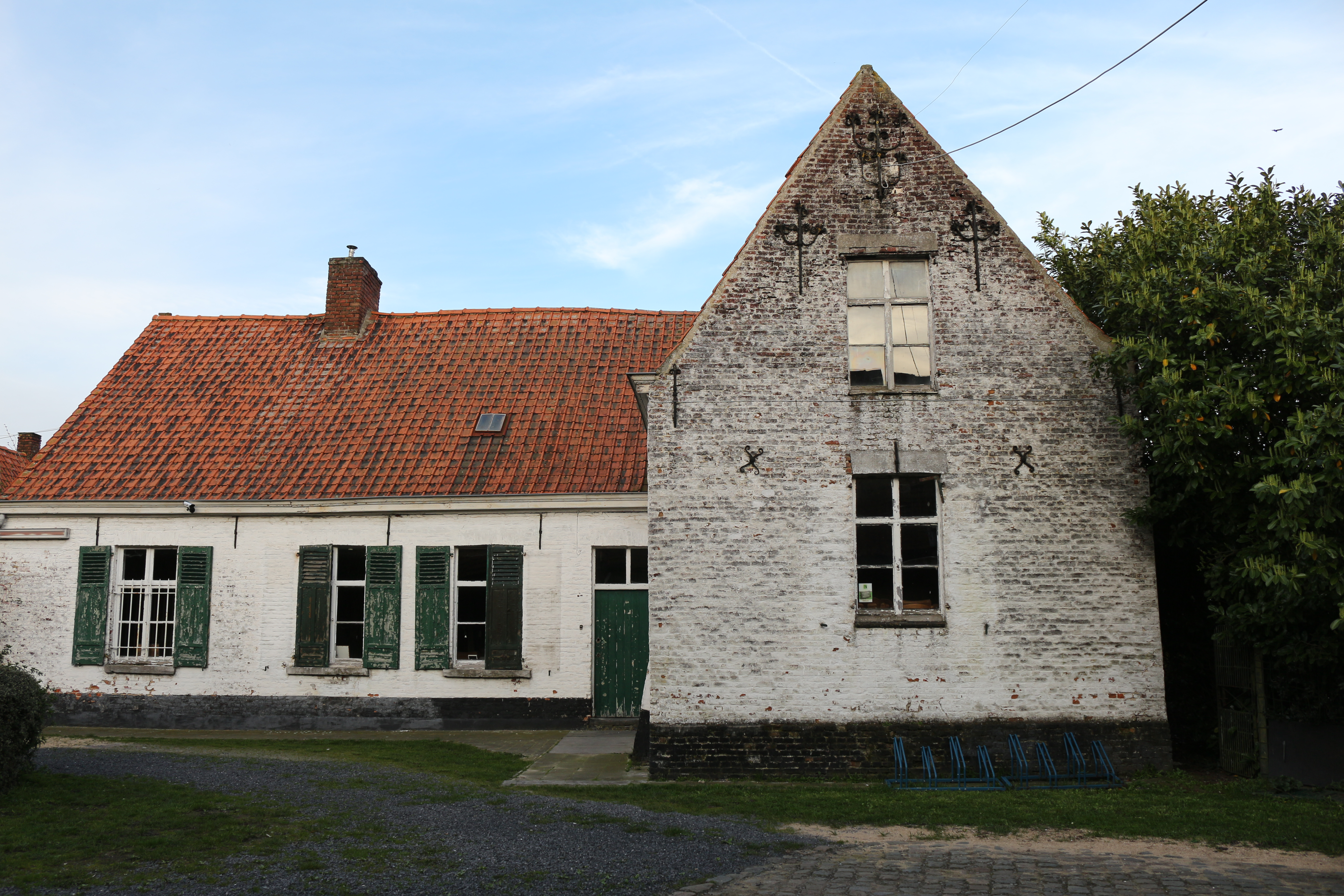 Een merkwaardig boerenhuis gedateerd door middel van muurankers 1702 en met mogelijk oudere kern van 1623